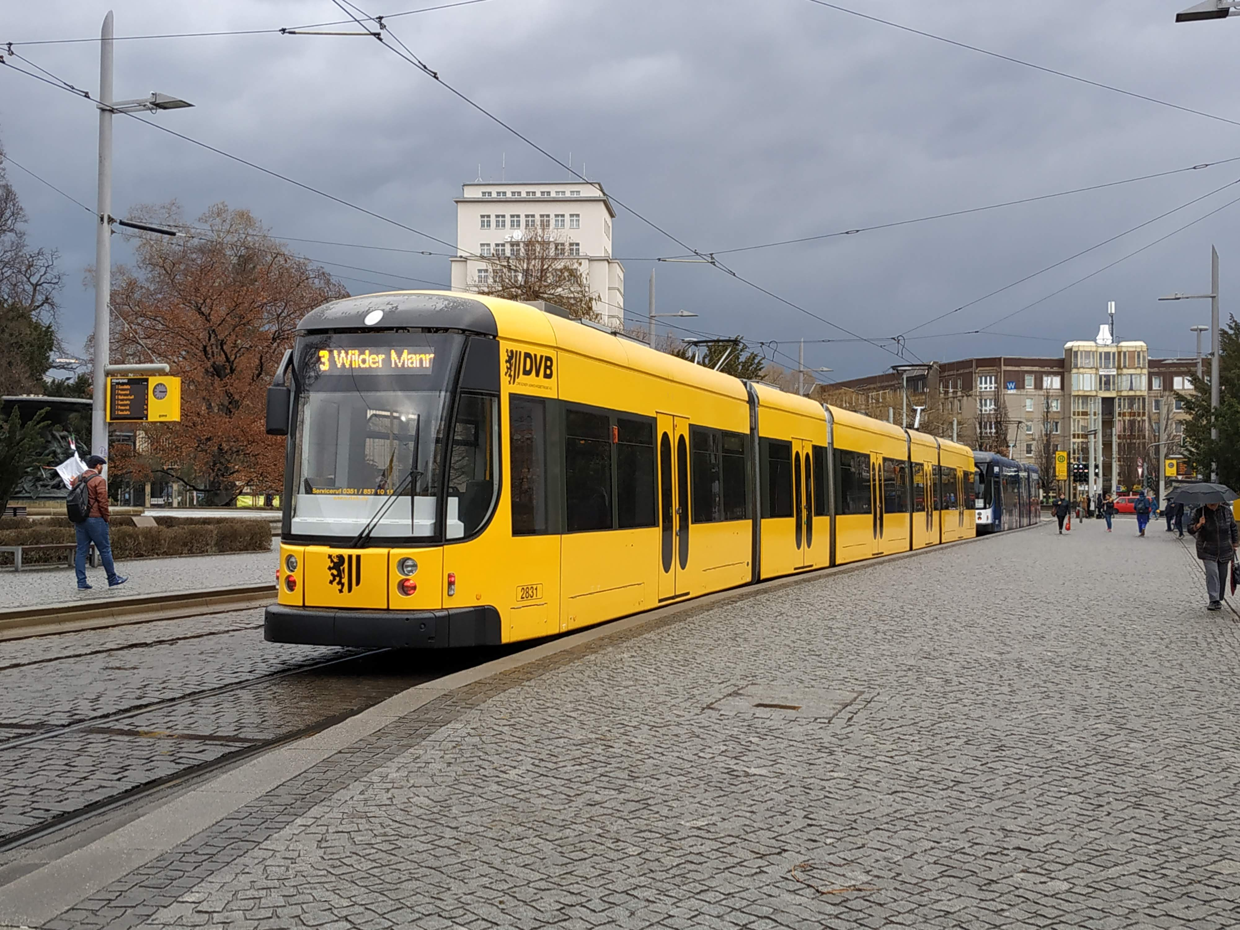 NGT D12DD (Dresde) n°2831 (2019)